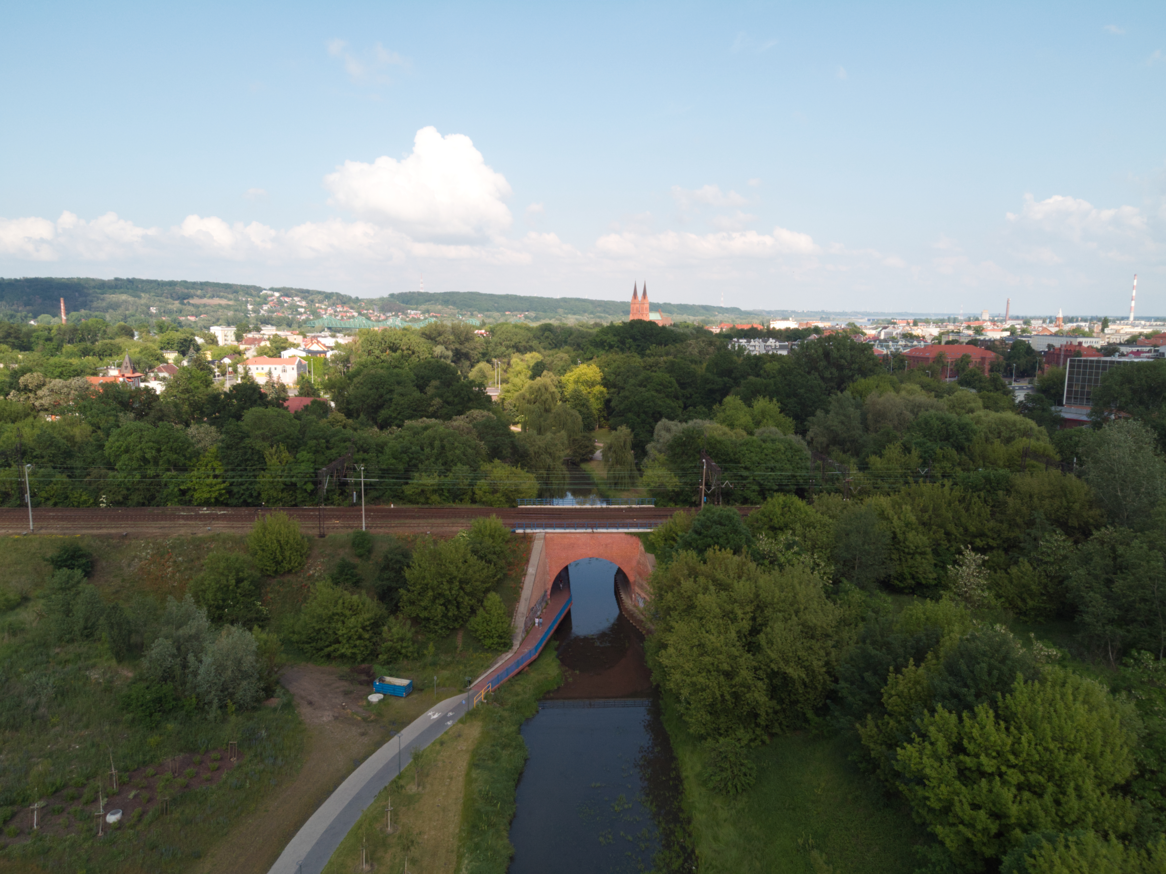 Park Sienkiewicza (2020 r.)